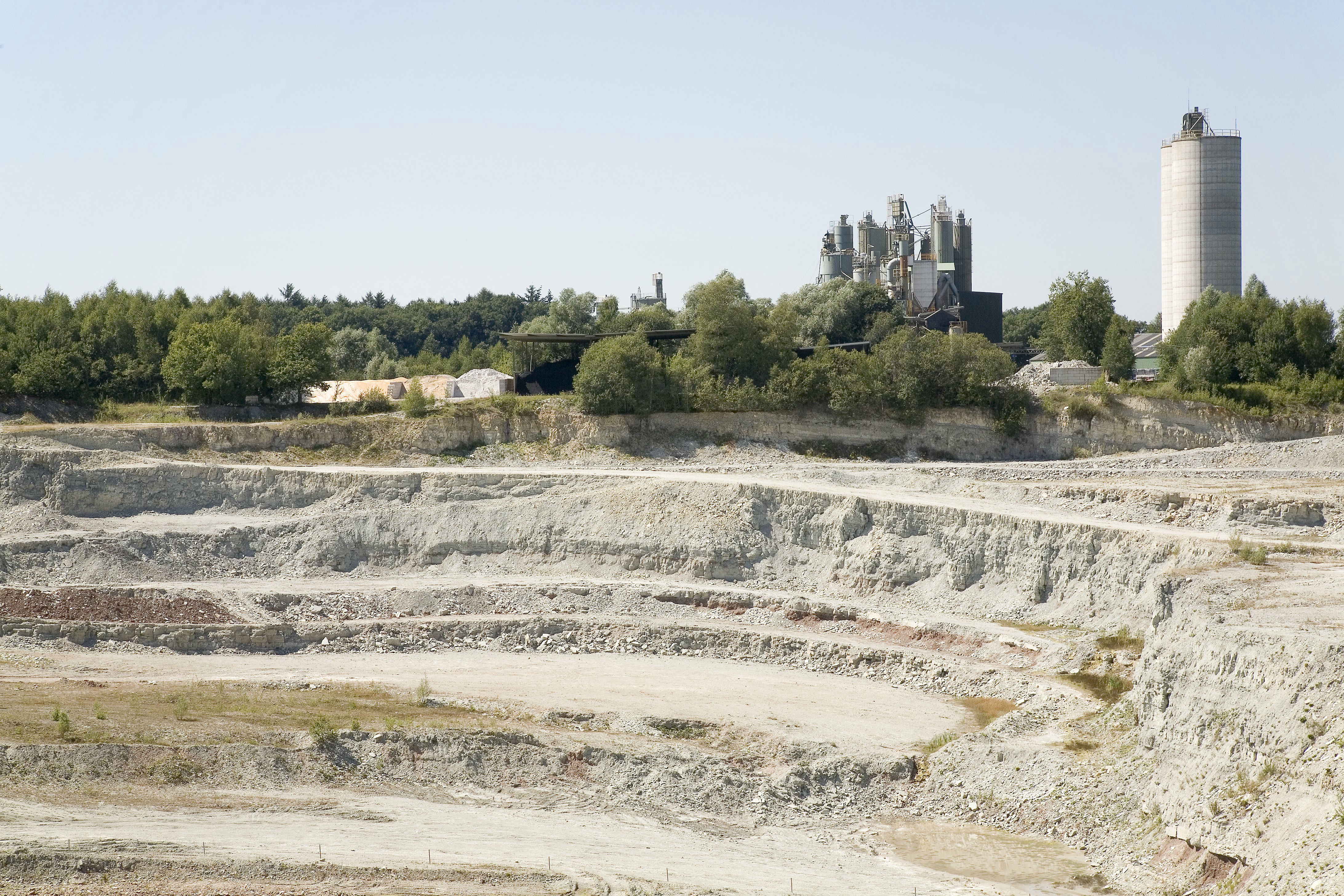 Steengroeve: Overzicht (opmerking: Publicatie: TRAP Winterswijk (Cultuurhistorische Routes in Nederland - 60))